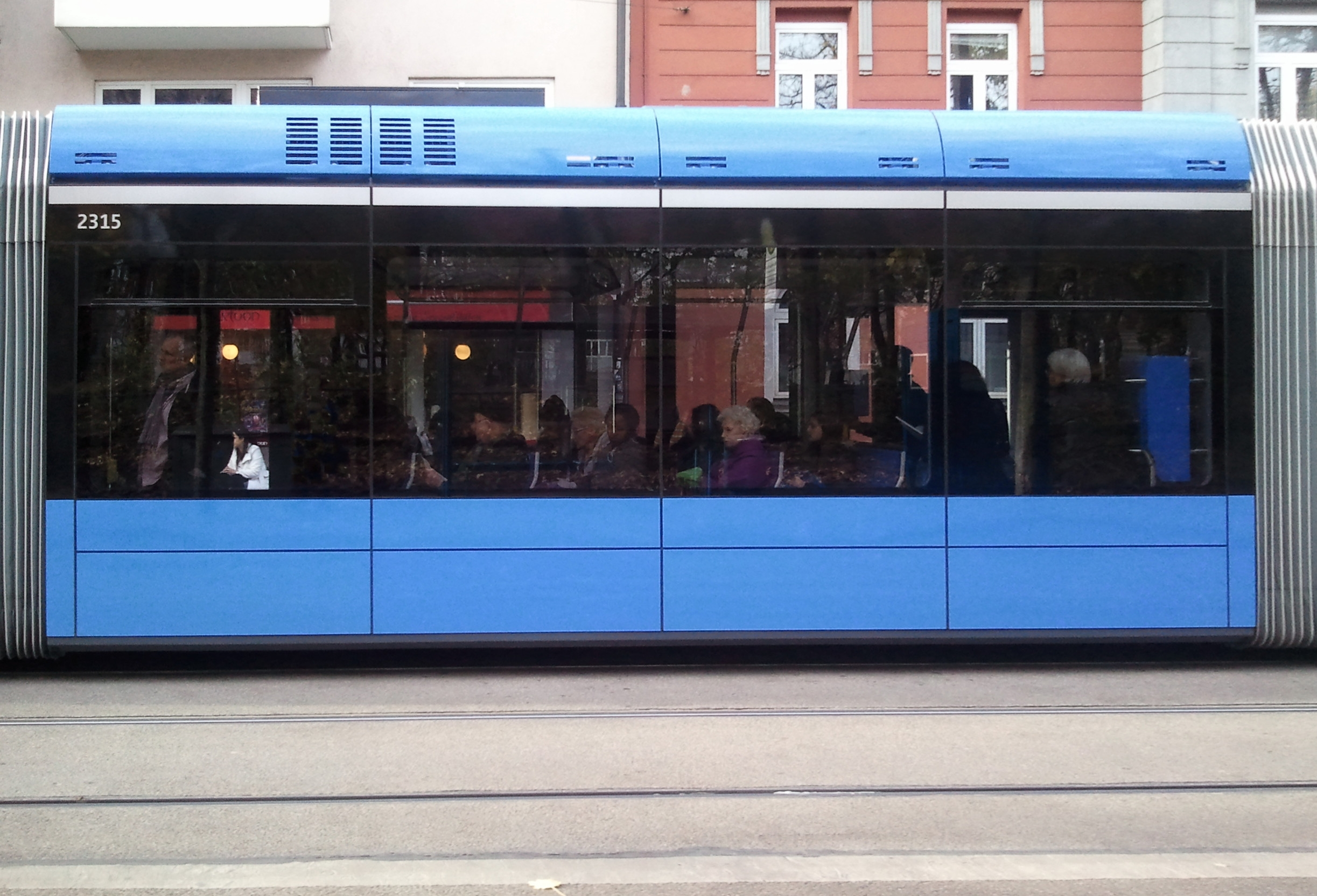 Die Wiege der Variobahn